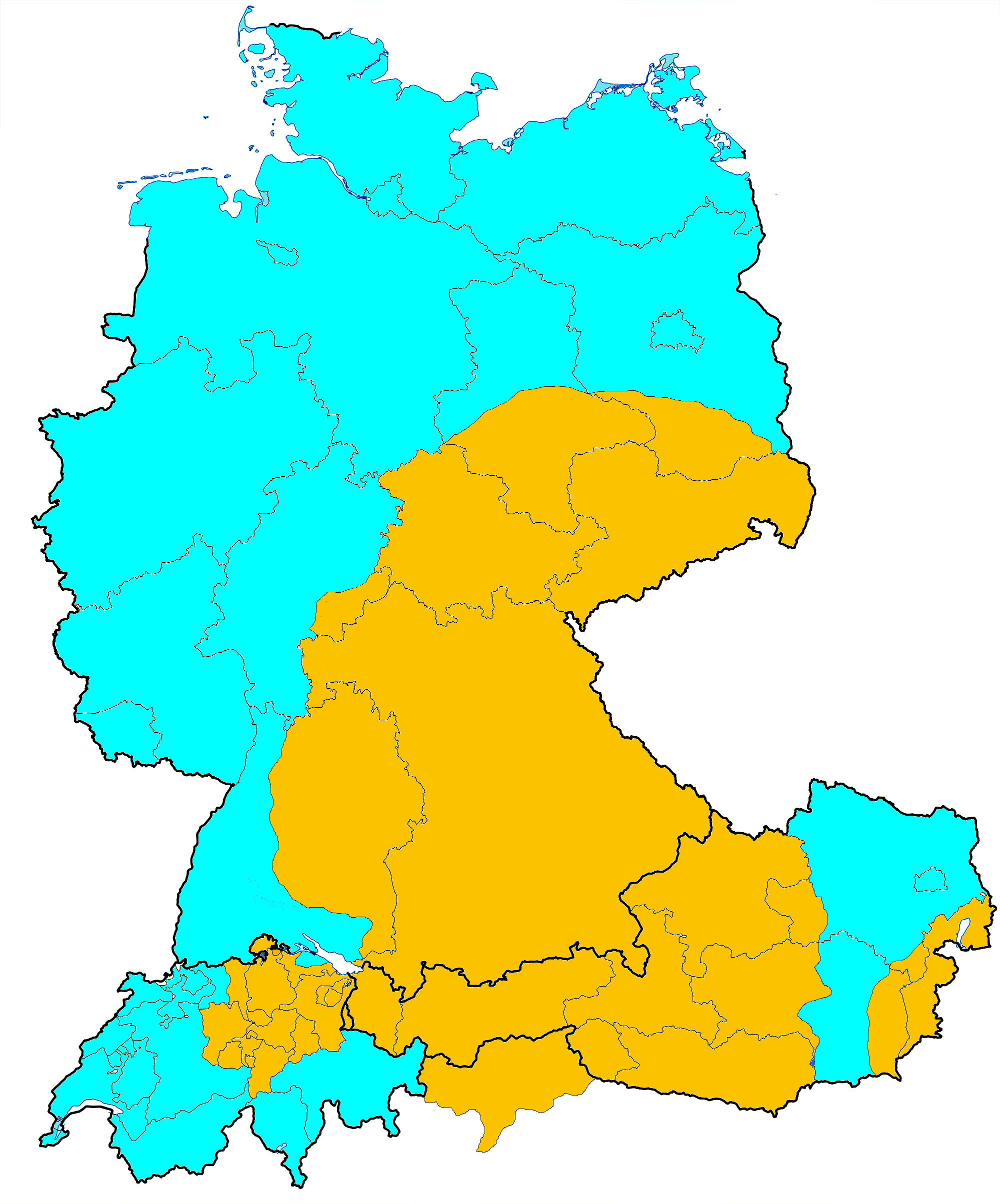 Verbreitung von französischen (blau) und deutschen (gelb) Kartenbildern in Deutschland, Liechtenstein, der Schweiz und Österreich (mit Südtirol).